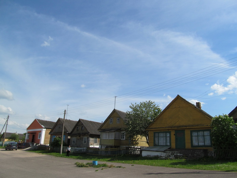 Моўчадзь. Карчма